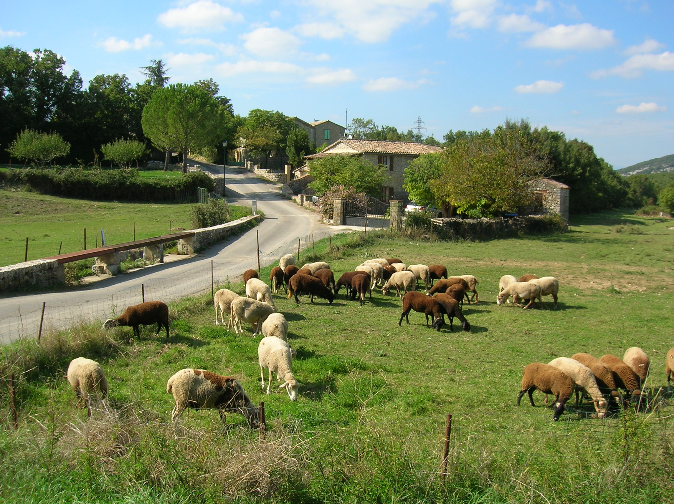 Bouquet, Gard, Languedoc-Roussillon-Midi-Pyrénées, France.